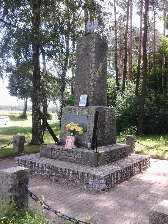 Pomnik Powstańców Styczniowych - Nowiny Brdowskie 2011